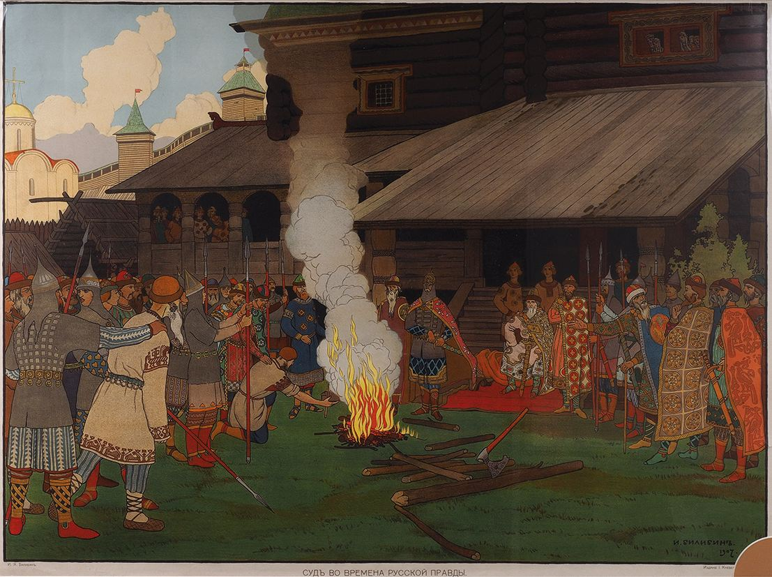 "Corte ai tempi della "Russkaja Pravda"". Acquerello // Dipinti sulla storia Russa. (Ed. Knebelâ, 1913). / Corte reale БИЛИБИН, ИВАН ЯКОВЛЕВИЧ (1876-1942). Суд во времена Русской Правды. 1909 г. Лист № 5 из серии «Картины по русской истории». Изд. И. Кнебеля. Хромолитография. 63,5 х 85,5 см.